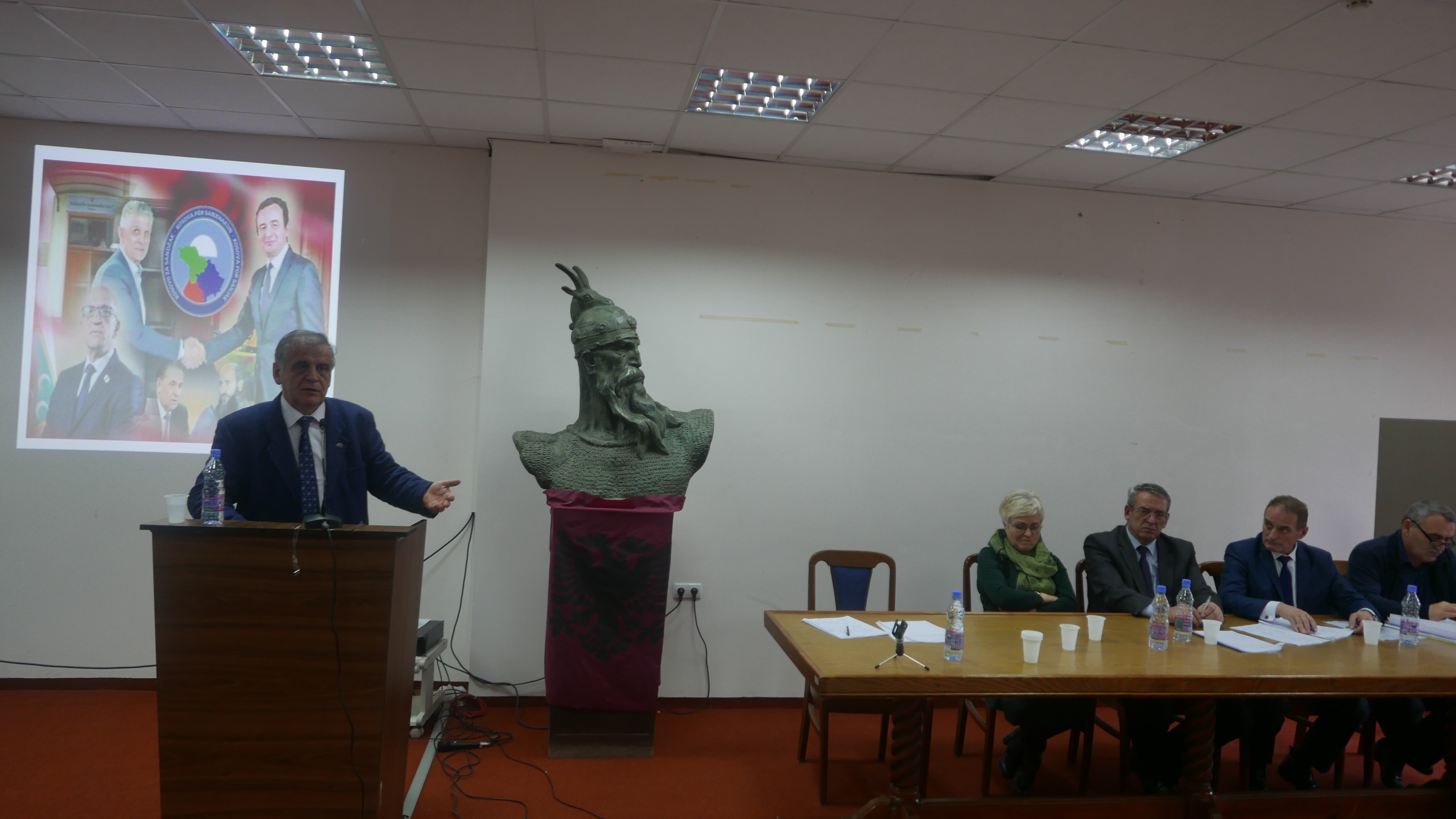 Në Kuvendin e II te shoqatës Kosova për Sanxhakun